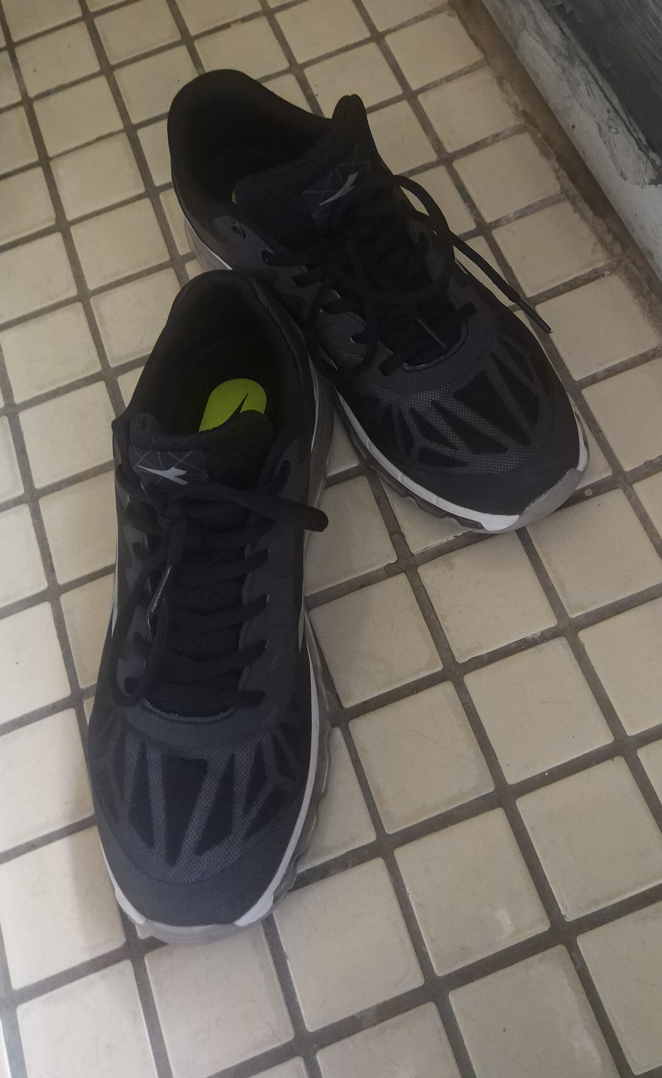 一雙Diadora的鞋品